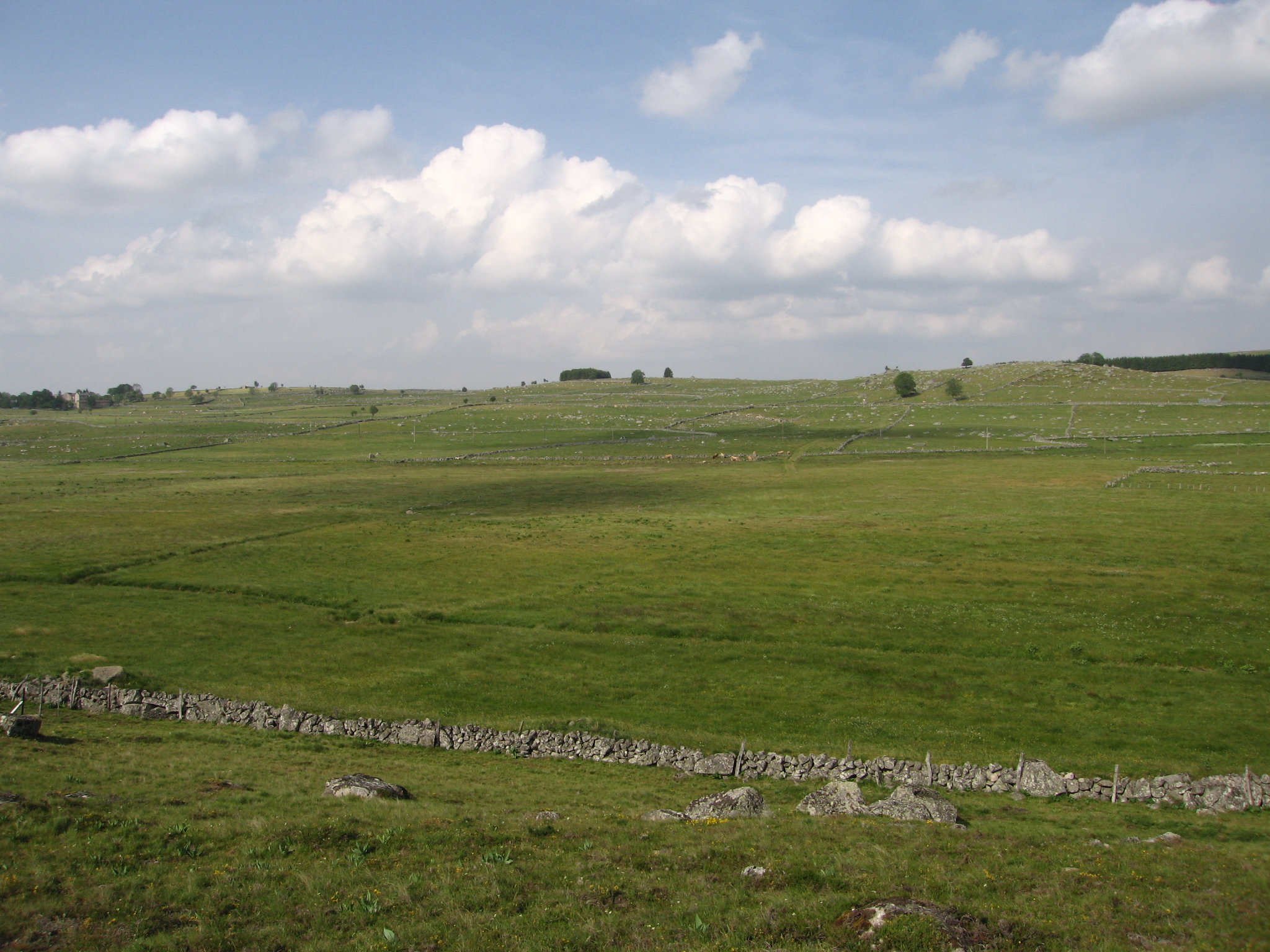 Aubrac